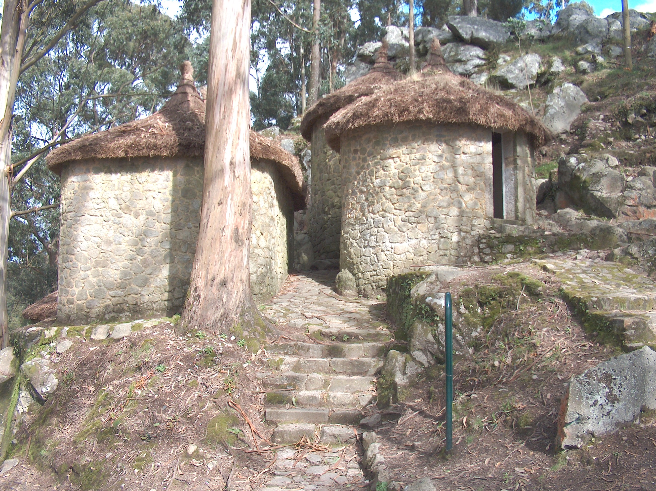 Castro de São Lourenço. Castro de São Lourenço, na freguesia de Vila Chã,concelho de Esposende, distrito de Braga, Portugal.